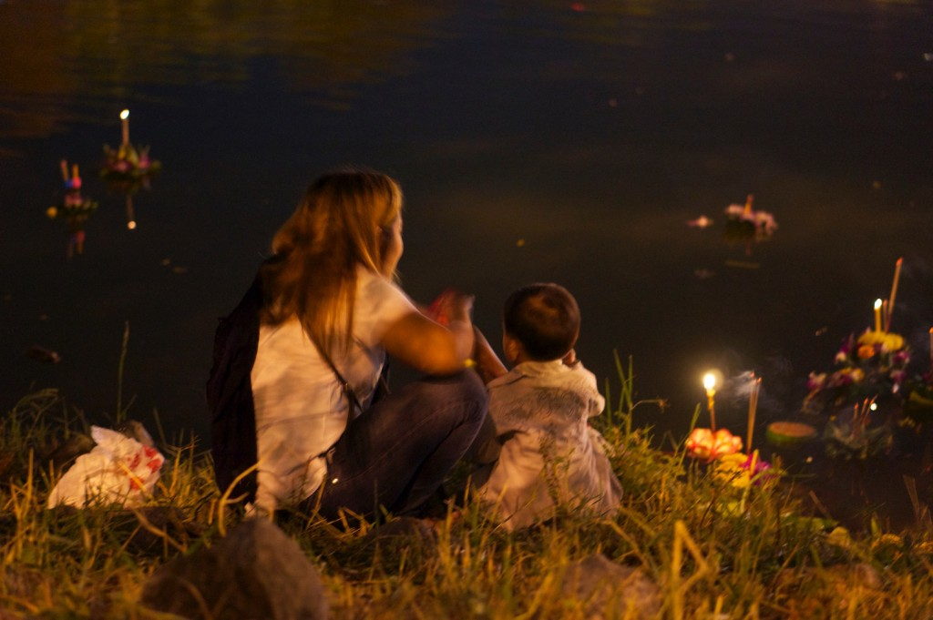 Une mère et son enfant lachent un Krathong à Udon Thani.